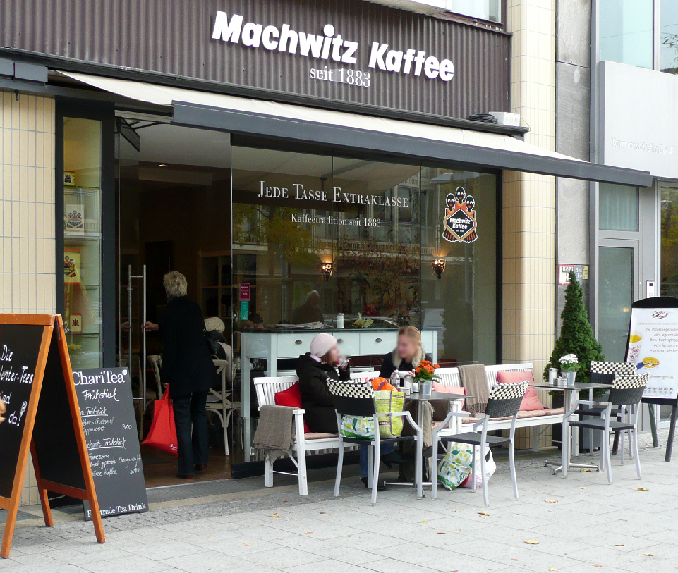 Cafe Machwitz Kaffee